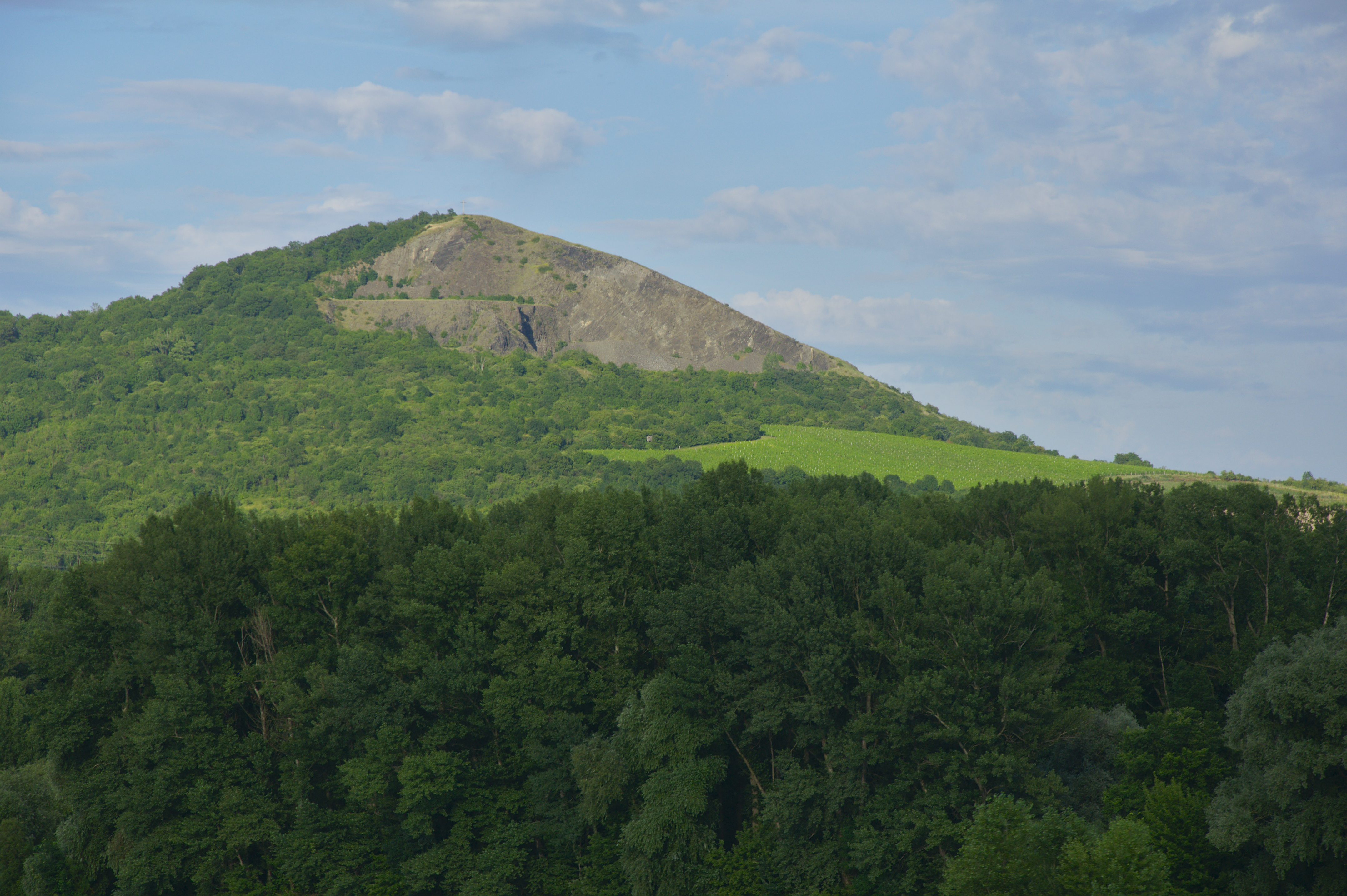 Přírodní rezervace Radobýl, okres Litoměřice